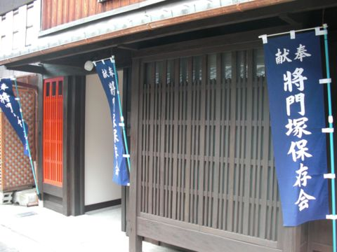 京都神田神宮外観